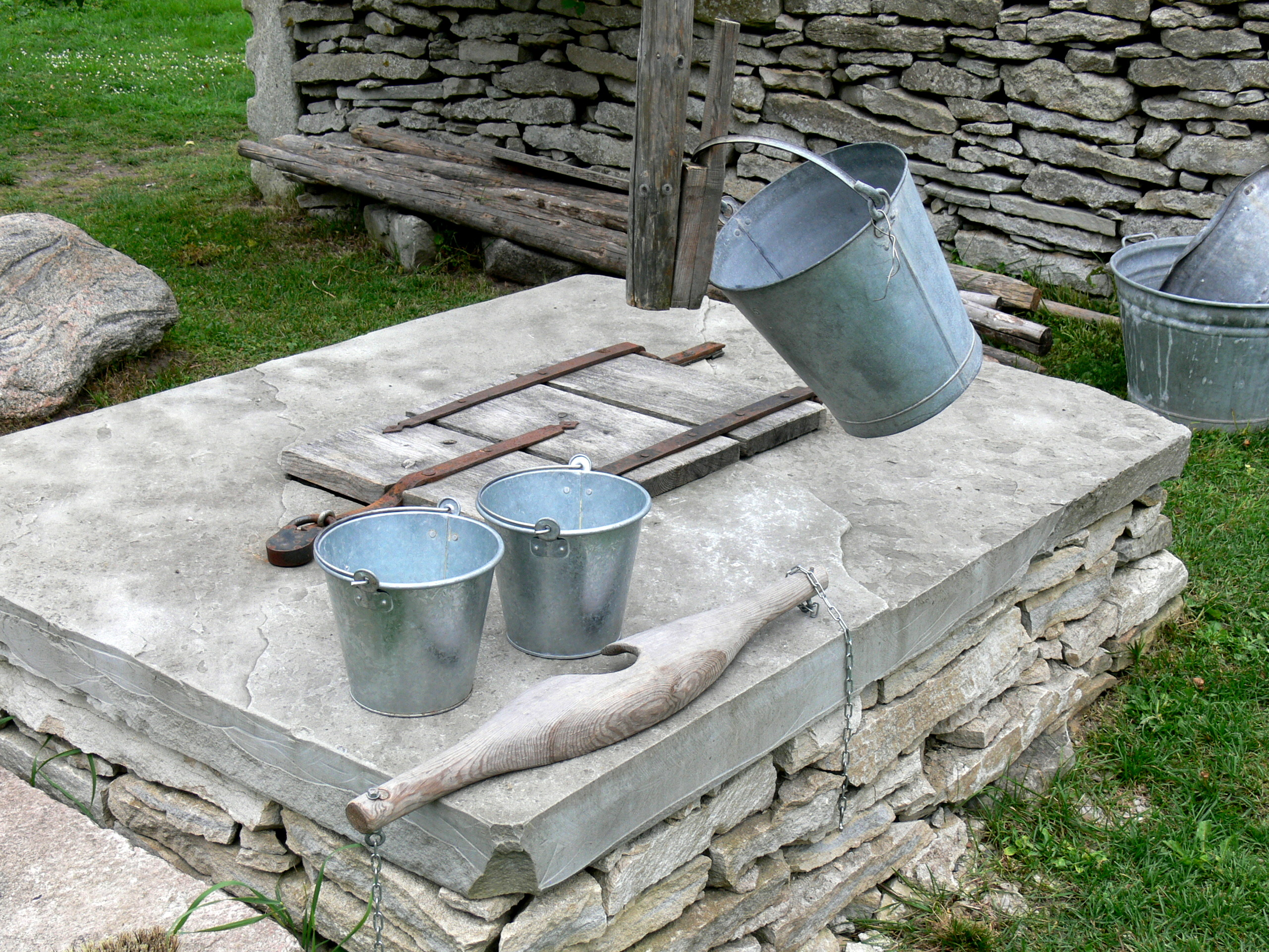 Bottarve Museum auf Gotland. Ziehbrunnen mit Eimern